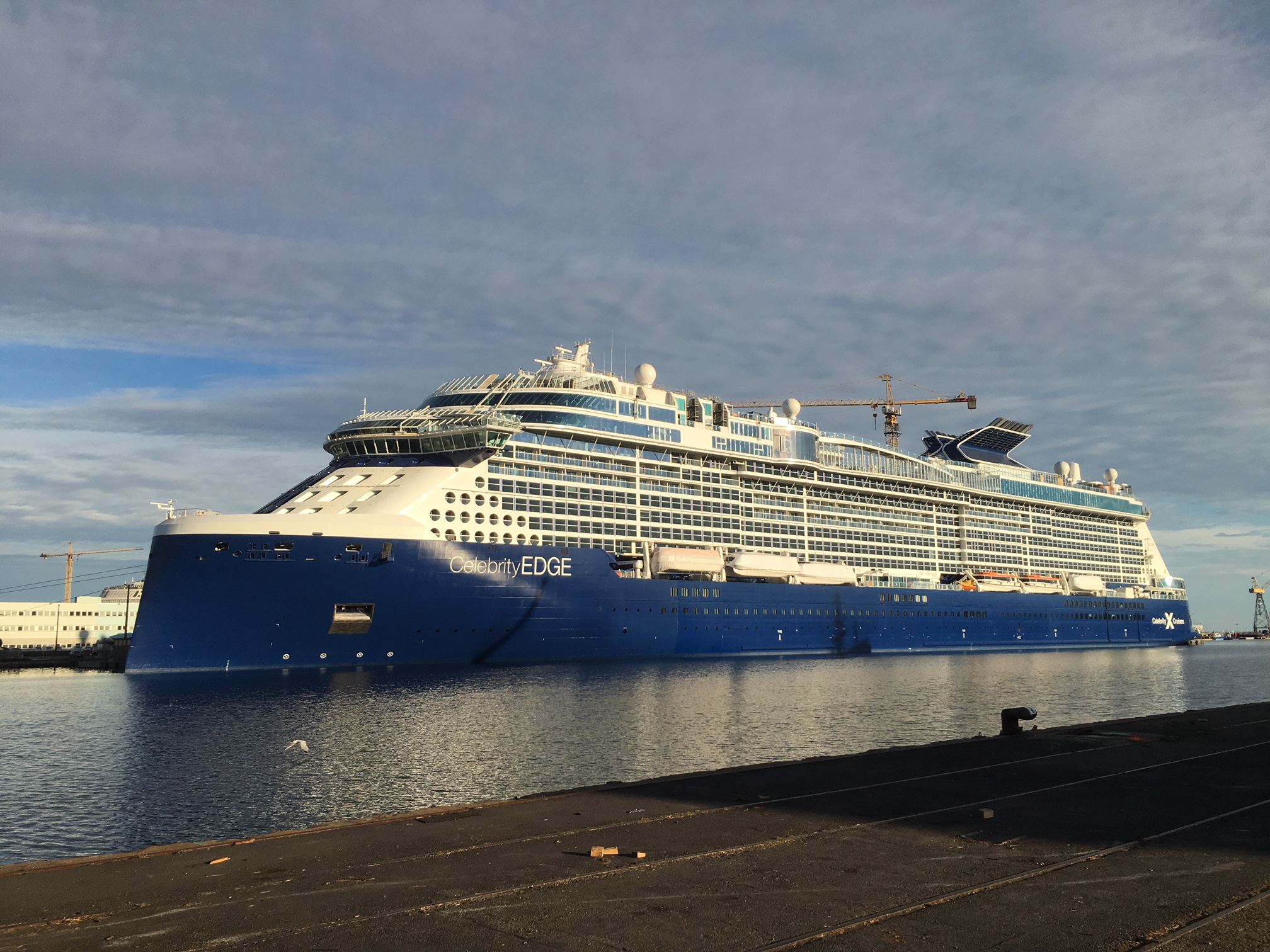 Le Celebrity Edge attend paisiblement sa livraison à Saint Nazaire